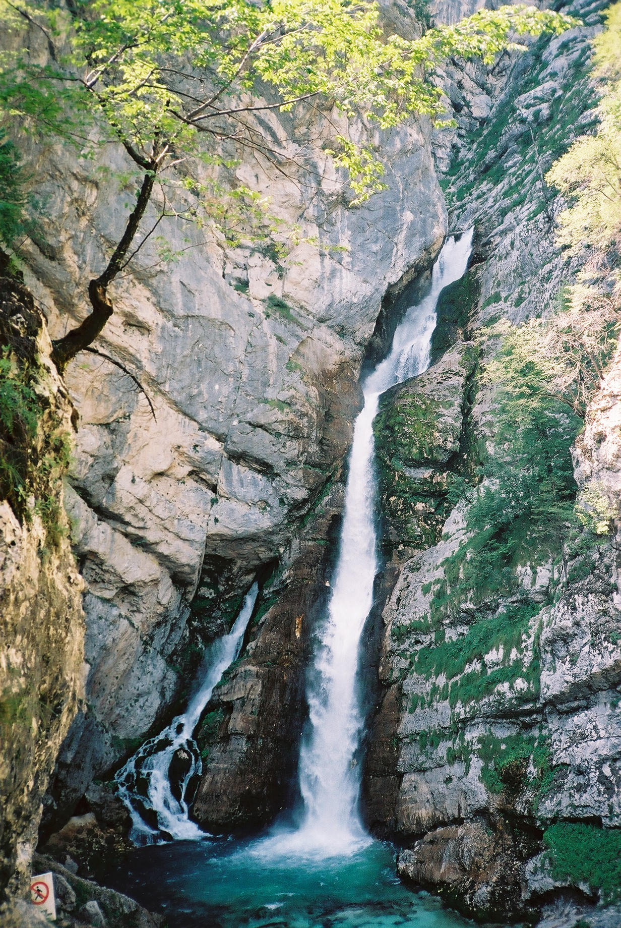 Savica Waterfall, Slovenia